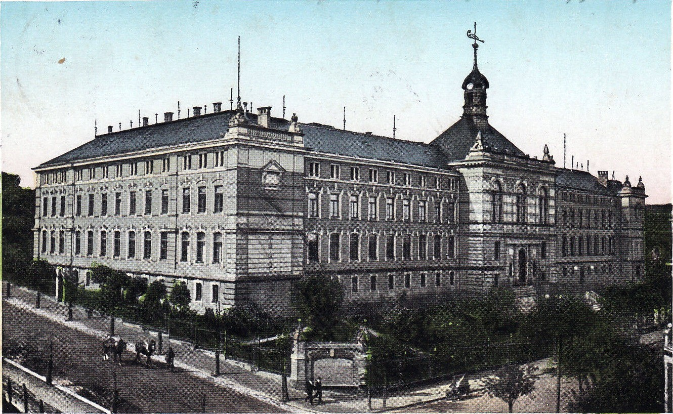 Königliches Sächsisches Lehrerseminar in Dresden-Plauen, heute Gymnasium Dresden-Plauen